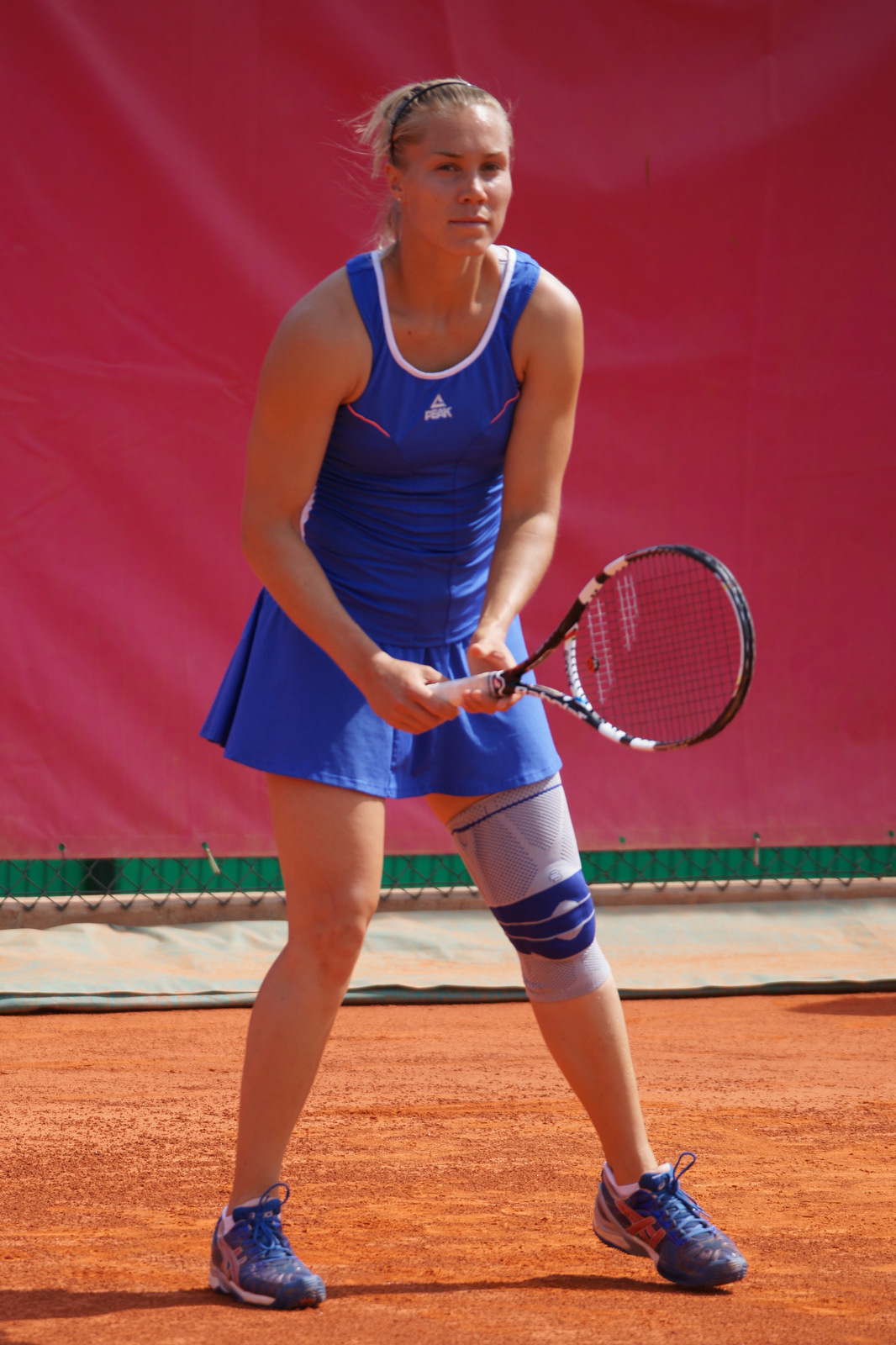 Nina Bratchikova, Open ITF Cagnes-sur-Mer 2013